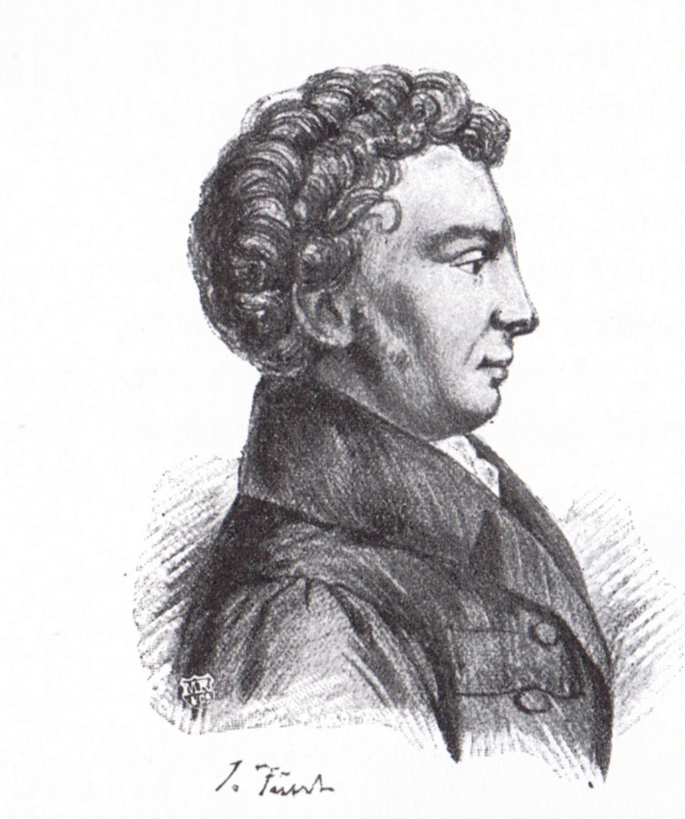 Uwe Jens Lornsen (1793-1838), Jurist und Beamter der dänischen Regierung. Durch seine Schrift Ueber das Verfassungswerk in Schleswigholstein wurde er zum Vorkämpfer eines geeinigten und unabhängigeren Schleswig-Holsteins, Zeichnung von Julius Fürst um 1895.